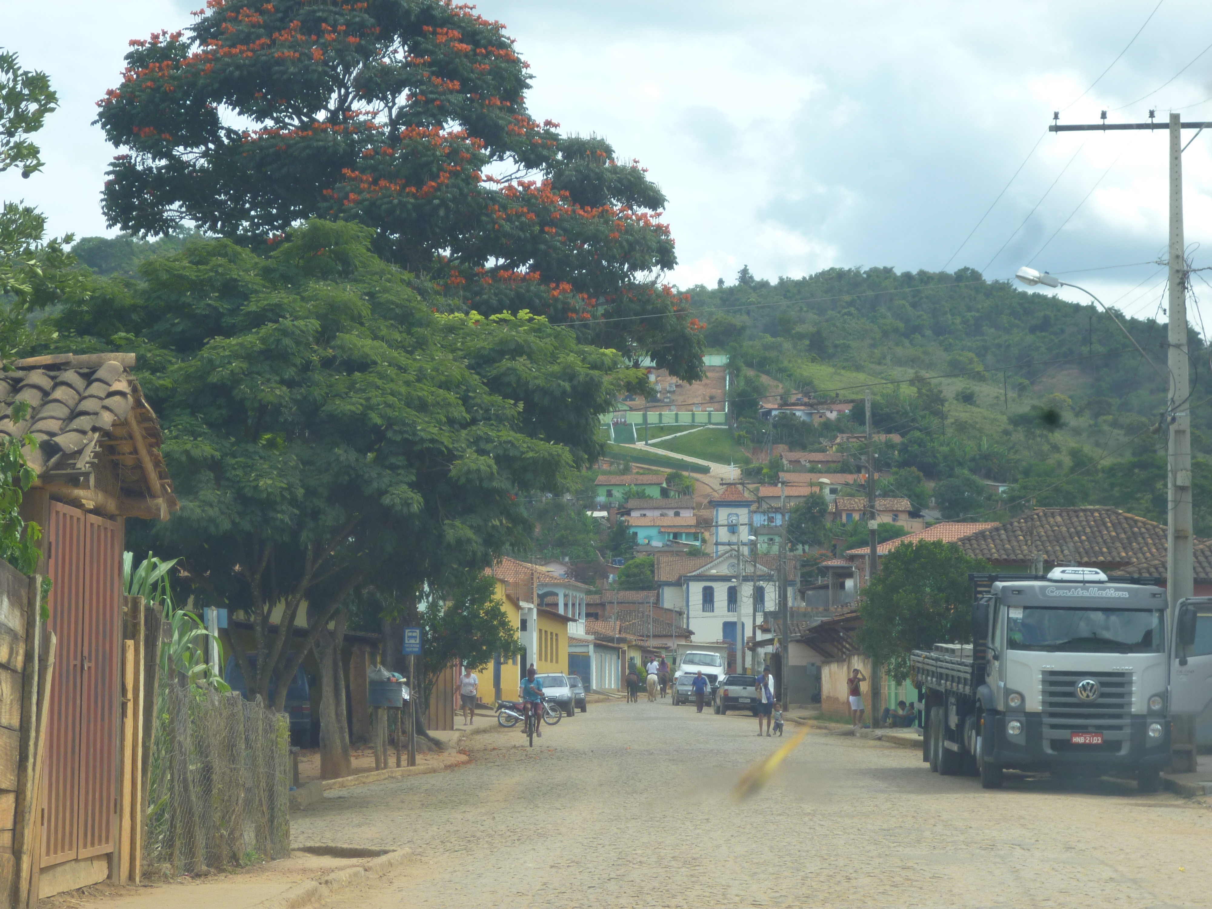 Euxenita, Sabinópolis MG Brasil - Vista da Avenida Principal